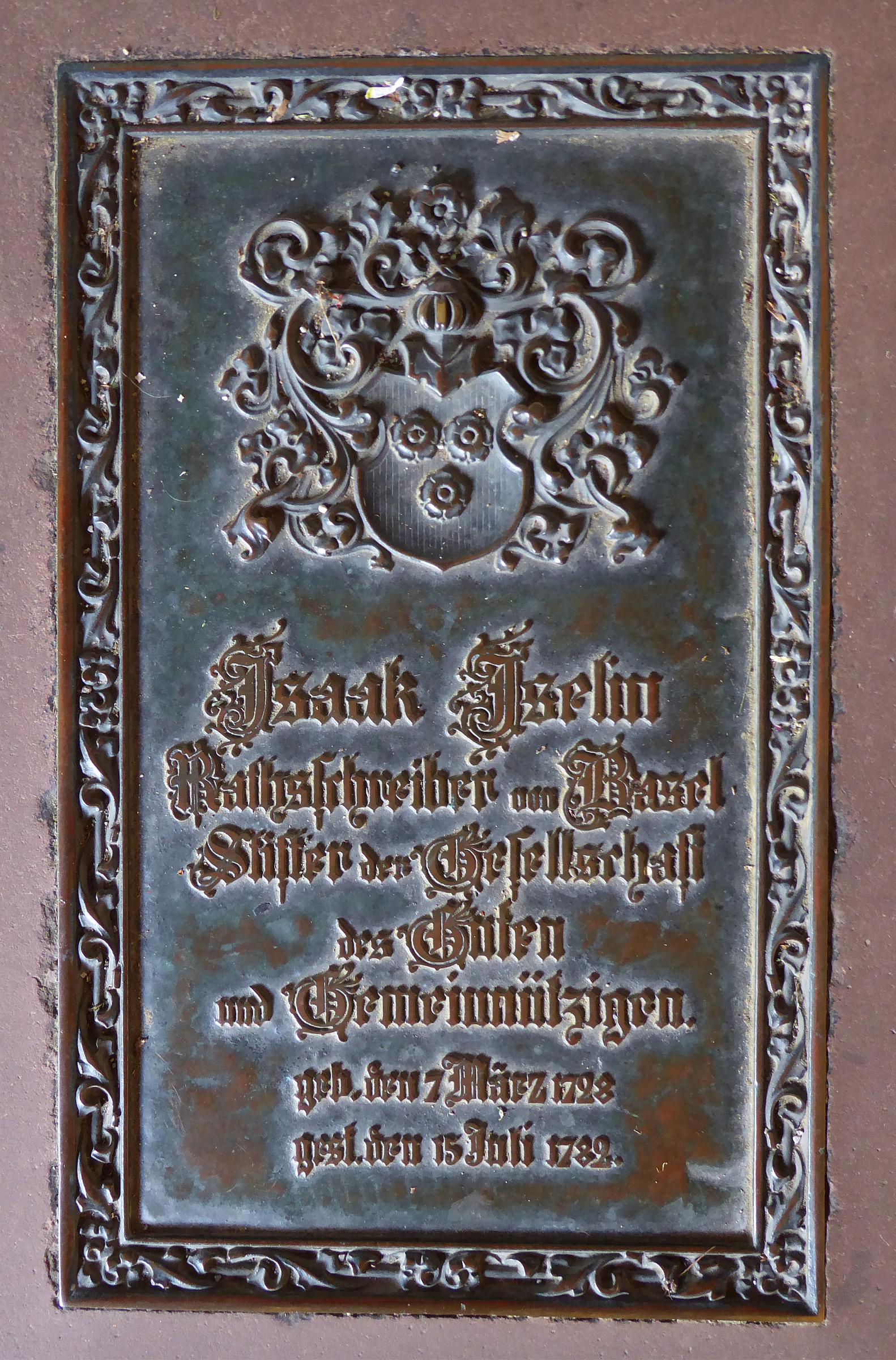 Isaak Iselin (1728–1782) Geschichtsphilosoph, Ratsschreiber, Stifter. Epitaphien (Grabtafeln) im gotische Doppelkreuzgang (15. Jh.) des Basler Münster.